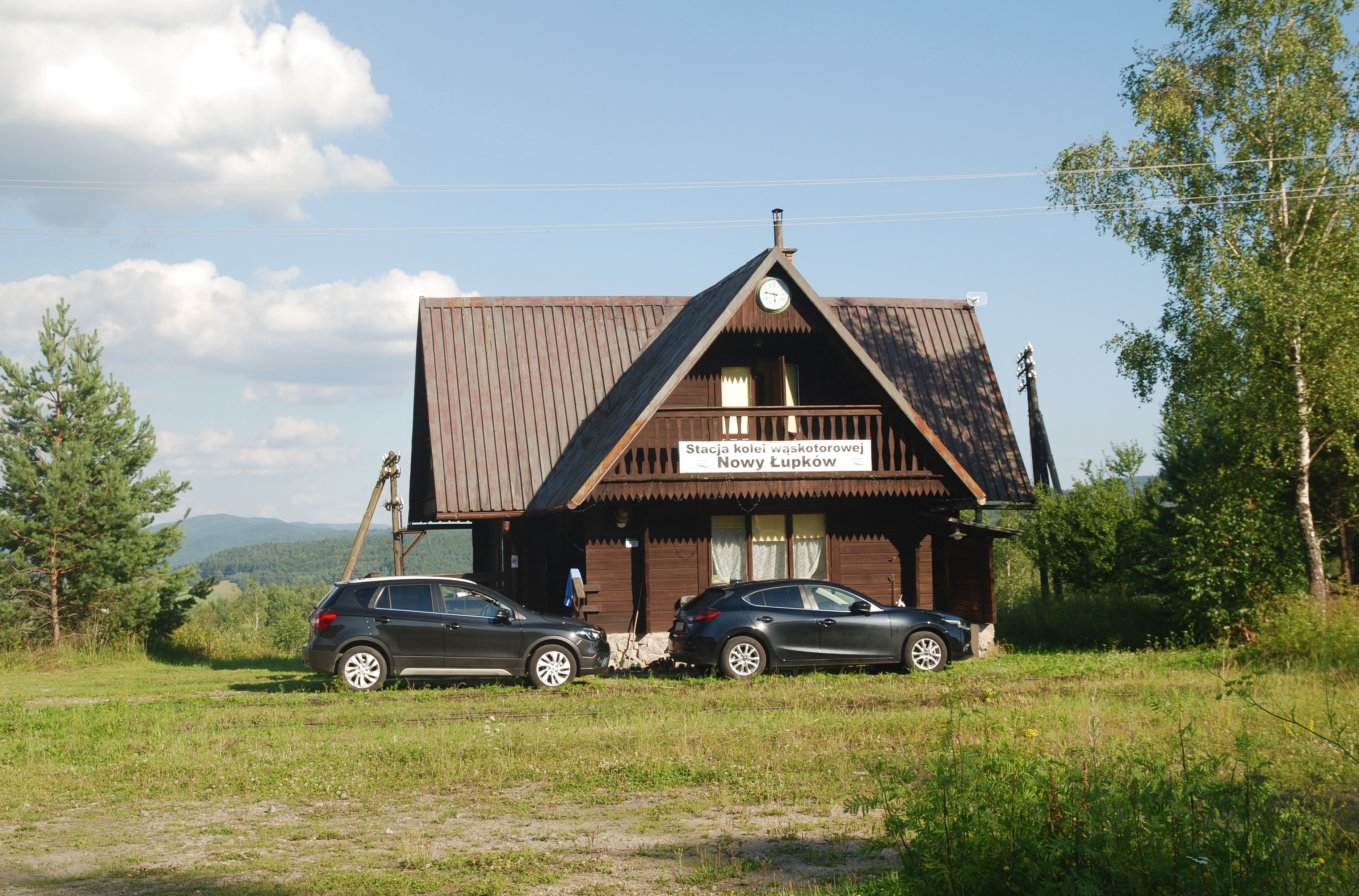 osada Nowy Łupków